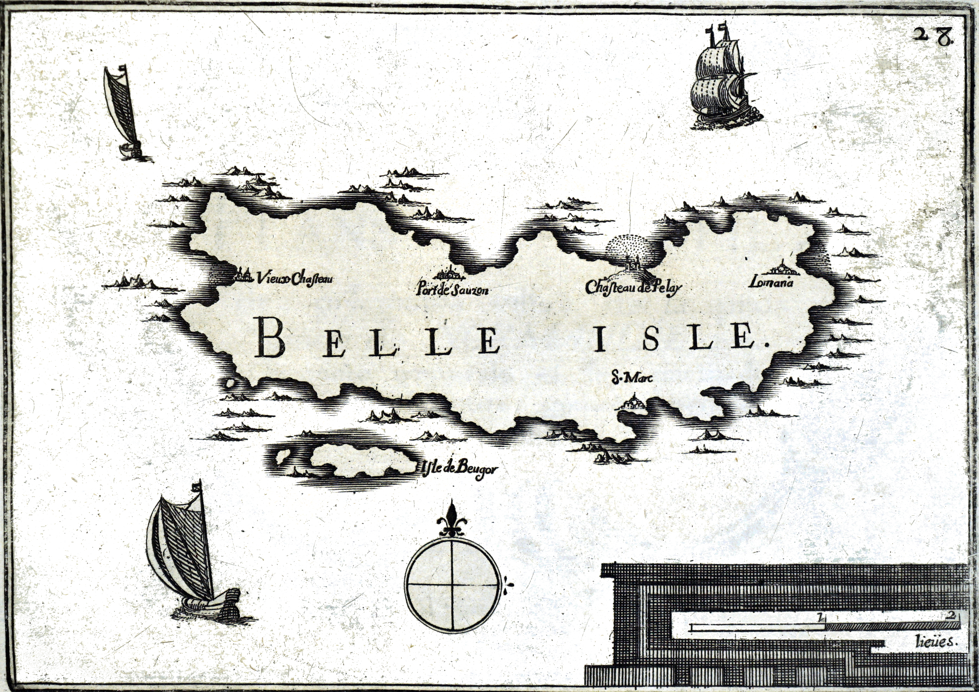 par Tassin dans Plans et profils.